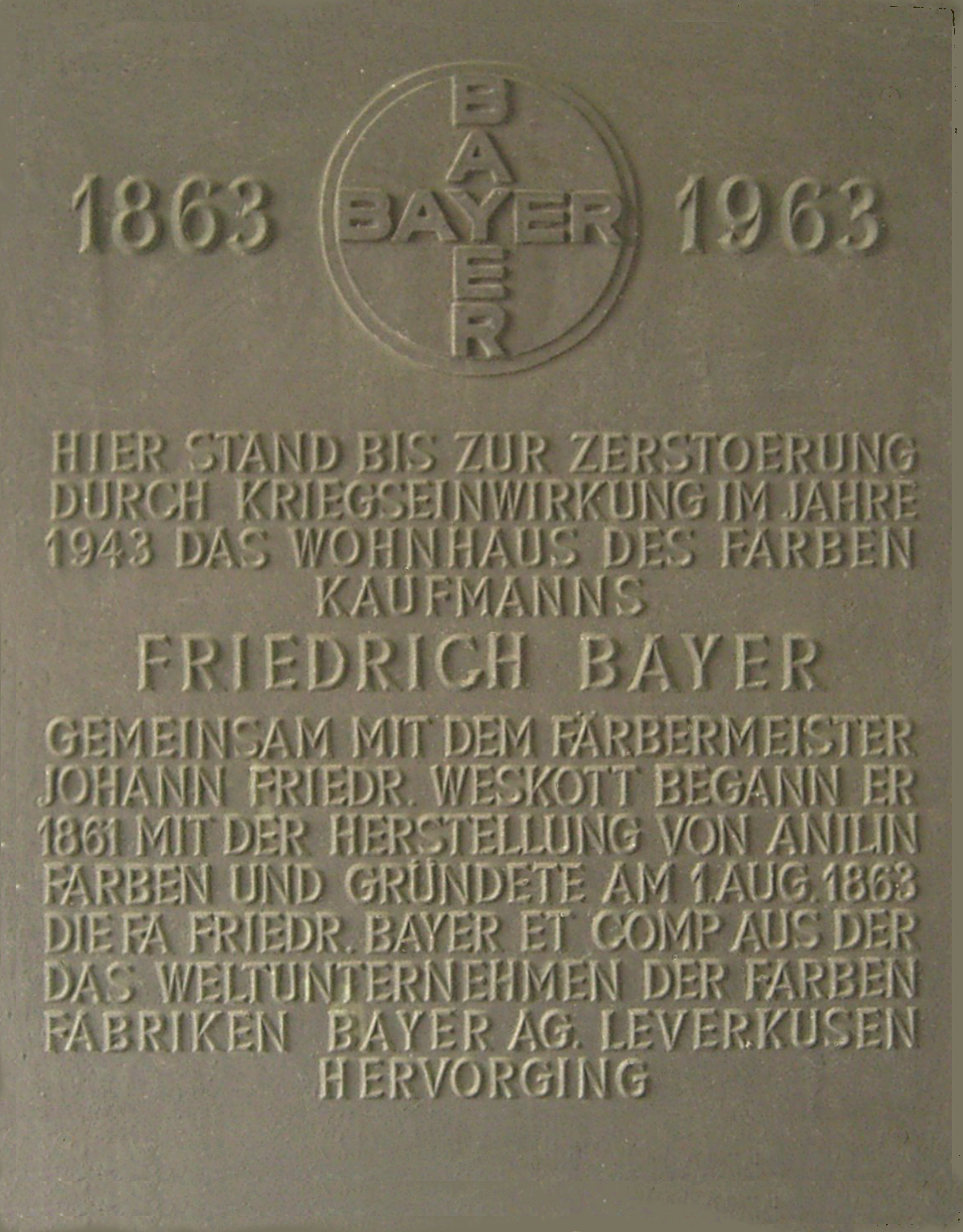 Gedenktafel für Friedrich Bayer am Wohnhaus in Wuppertal, Heckinghauser Straße 162